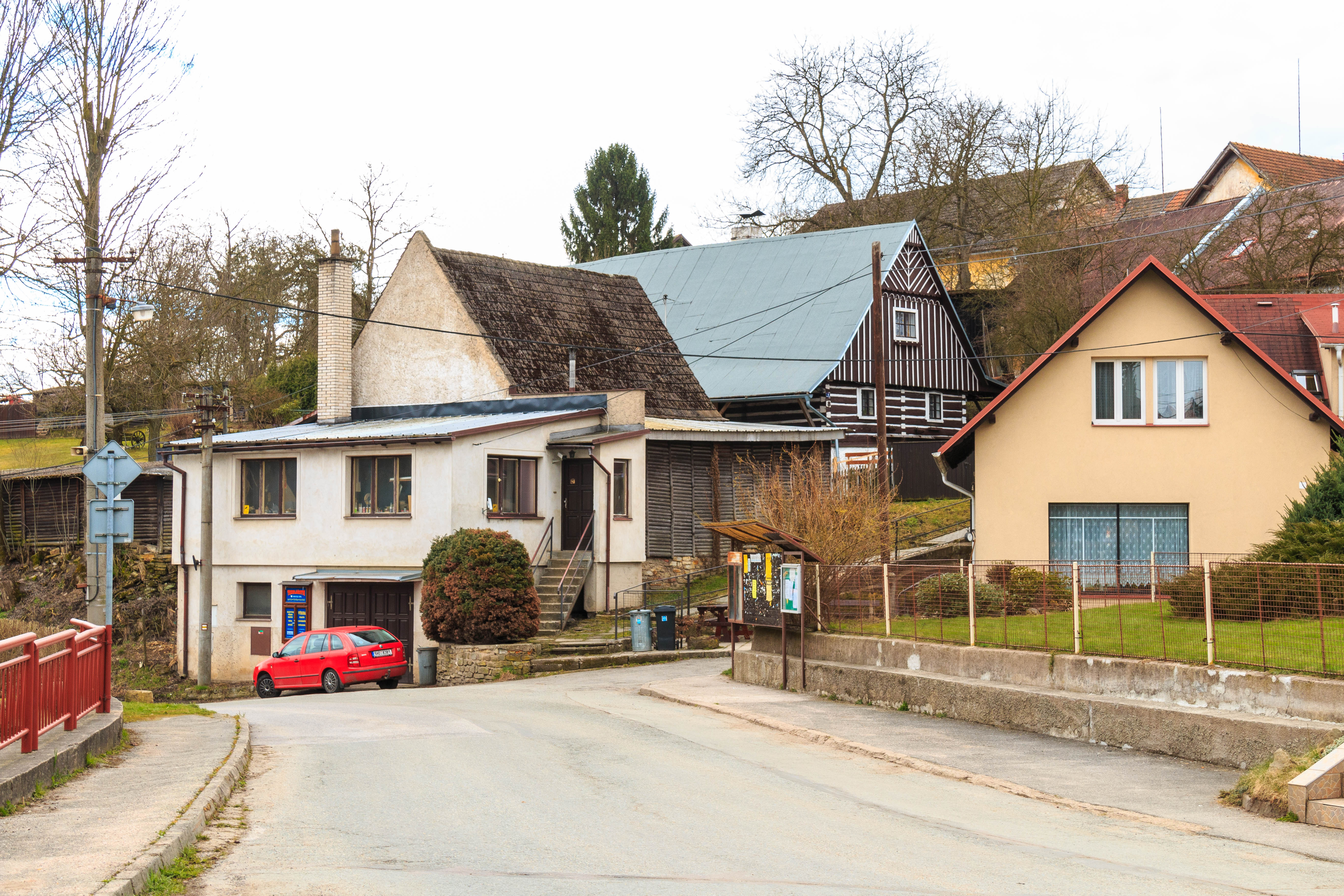 Lhota pod Hořičkami čp. 8